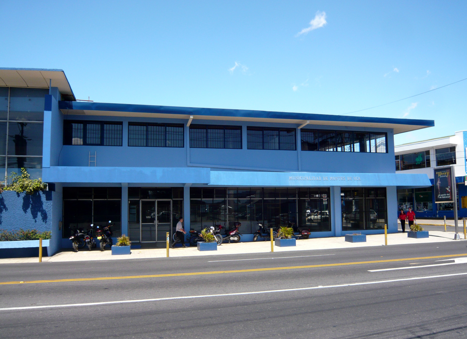 Administrasjonsbygning til Montes de Oca kanton i Costa Rica